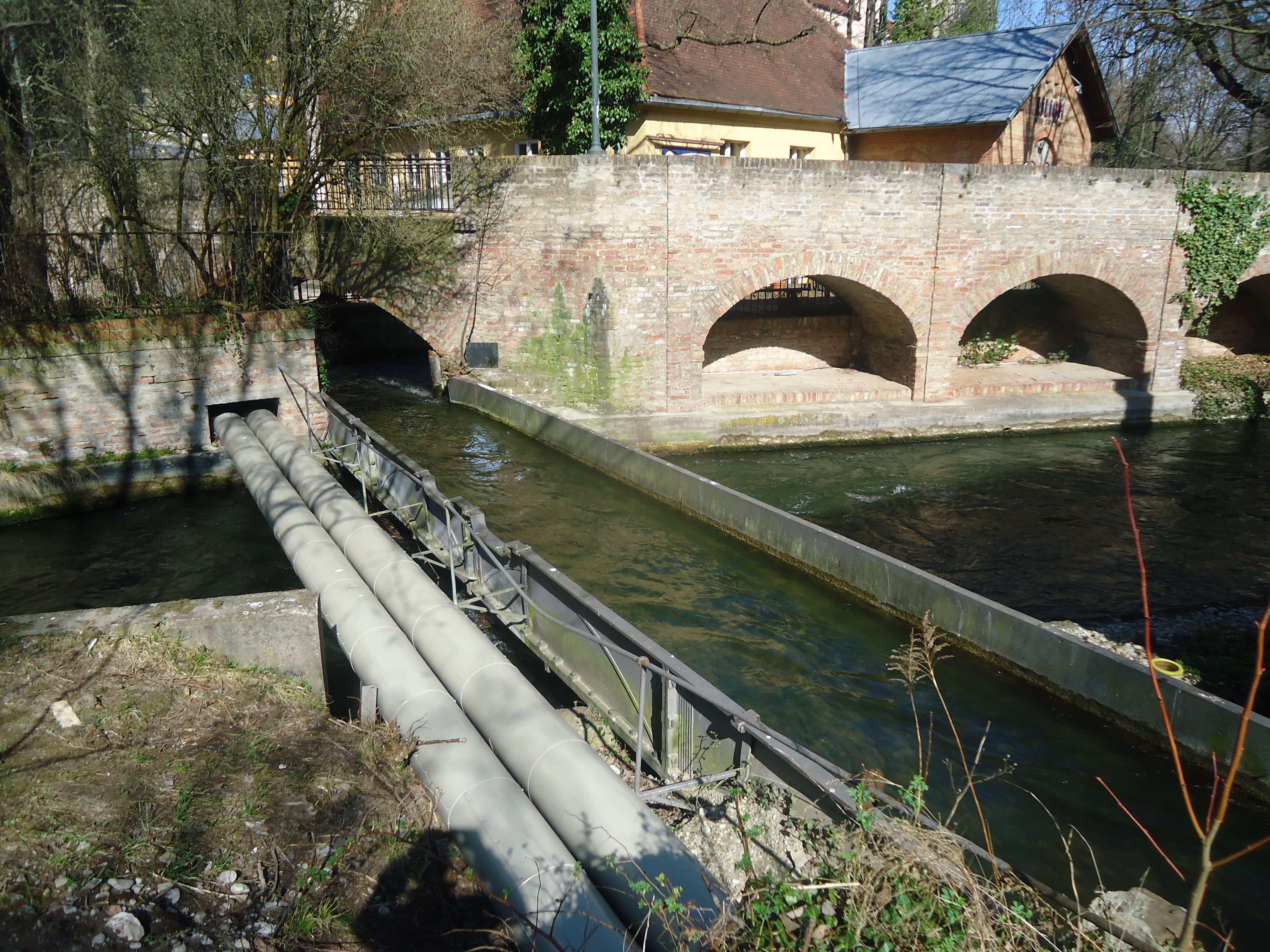 Kanalbrücke Stadtbach beim Liliom